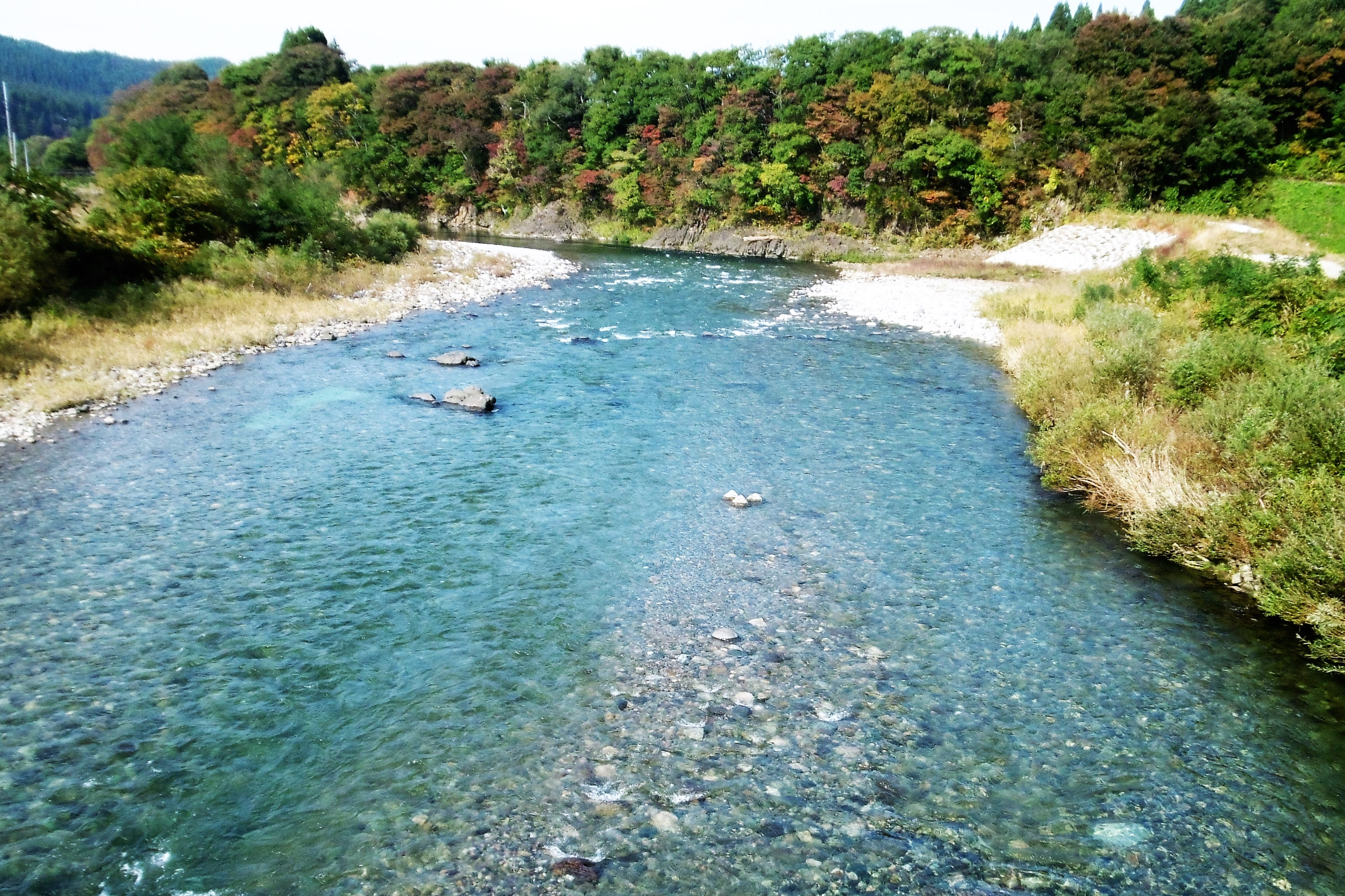 阿仁川：北秋田市小渕